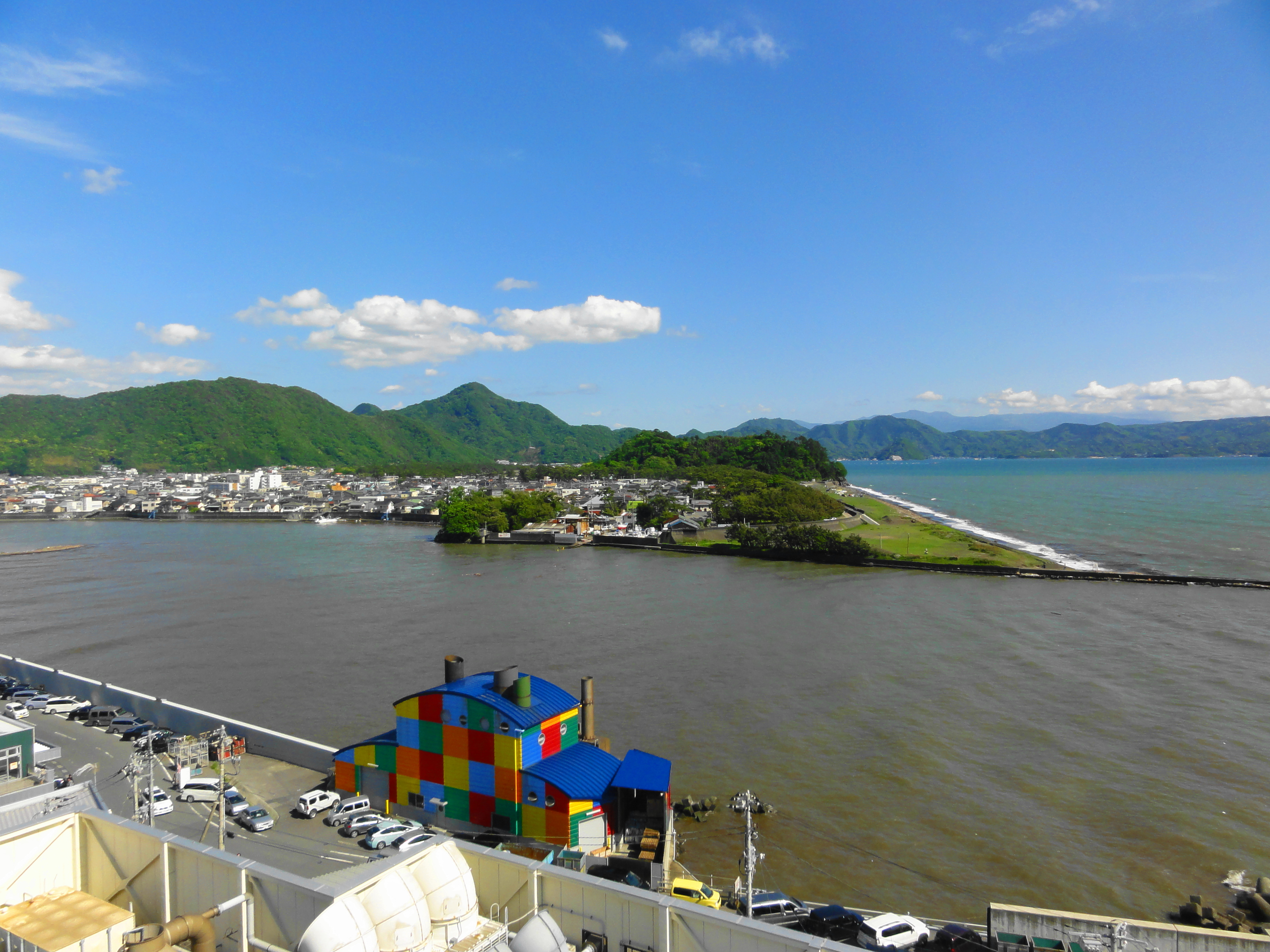 沼津港大型展望水門びゅうおから南東を望む。手前は狩野川の河口。